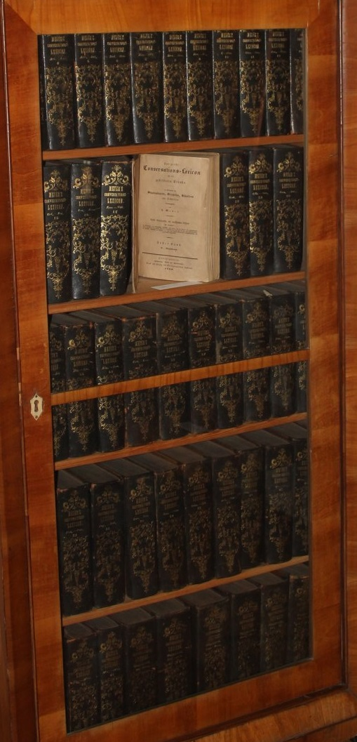 Das große Conversations-Lexicon für die gebildeten Stände. In Verbindung mit Staatsmännern, Gelehrten, Künstlern und Technikern ("Ur-Meyer"/ 0. Auflage von Meyers Konversations-Lexikon) im Stadtmuseum Hildburghausen